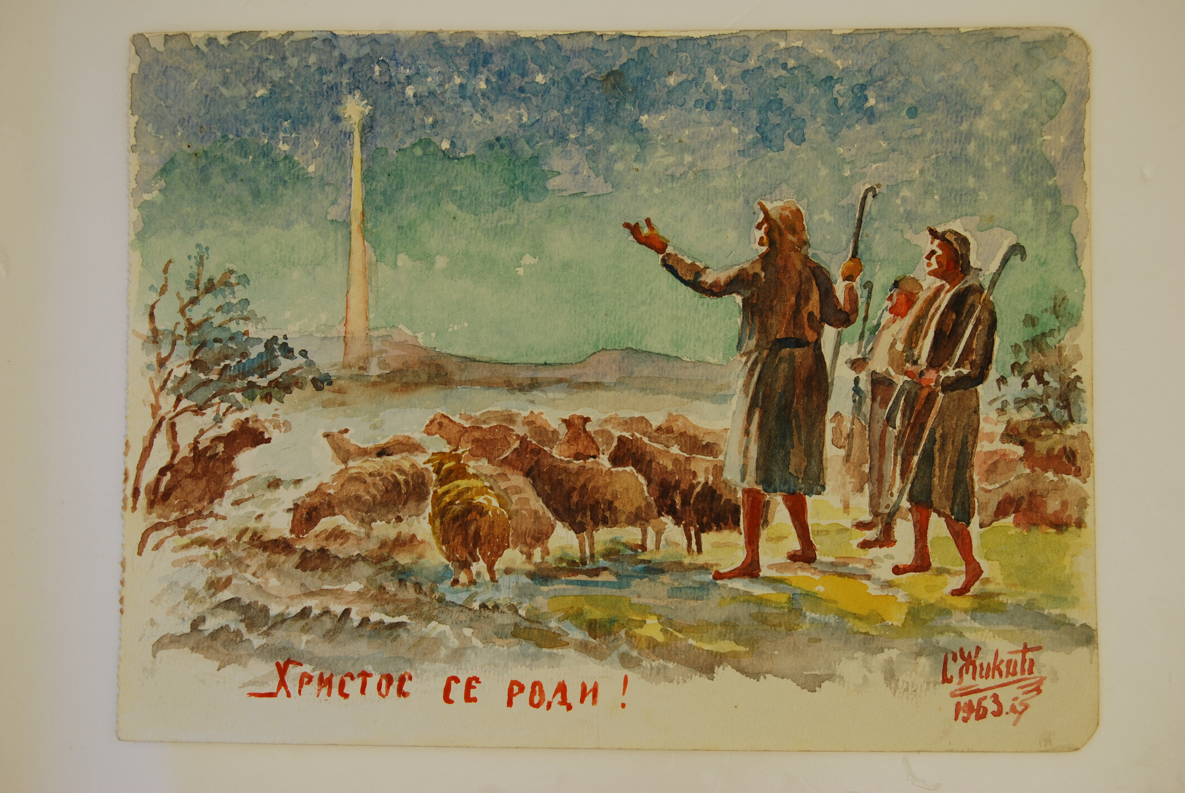 Sima Žikić, Božićna čestitka pismo, akvarel 1963. 17x23, Zavičajni muzej Knjaževac